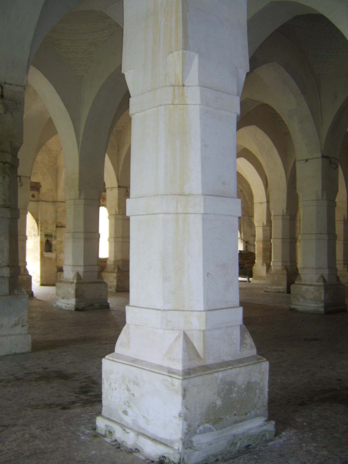 ষাট গম্বুজ মসজিদের ভিতরের স্তম্ভ।